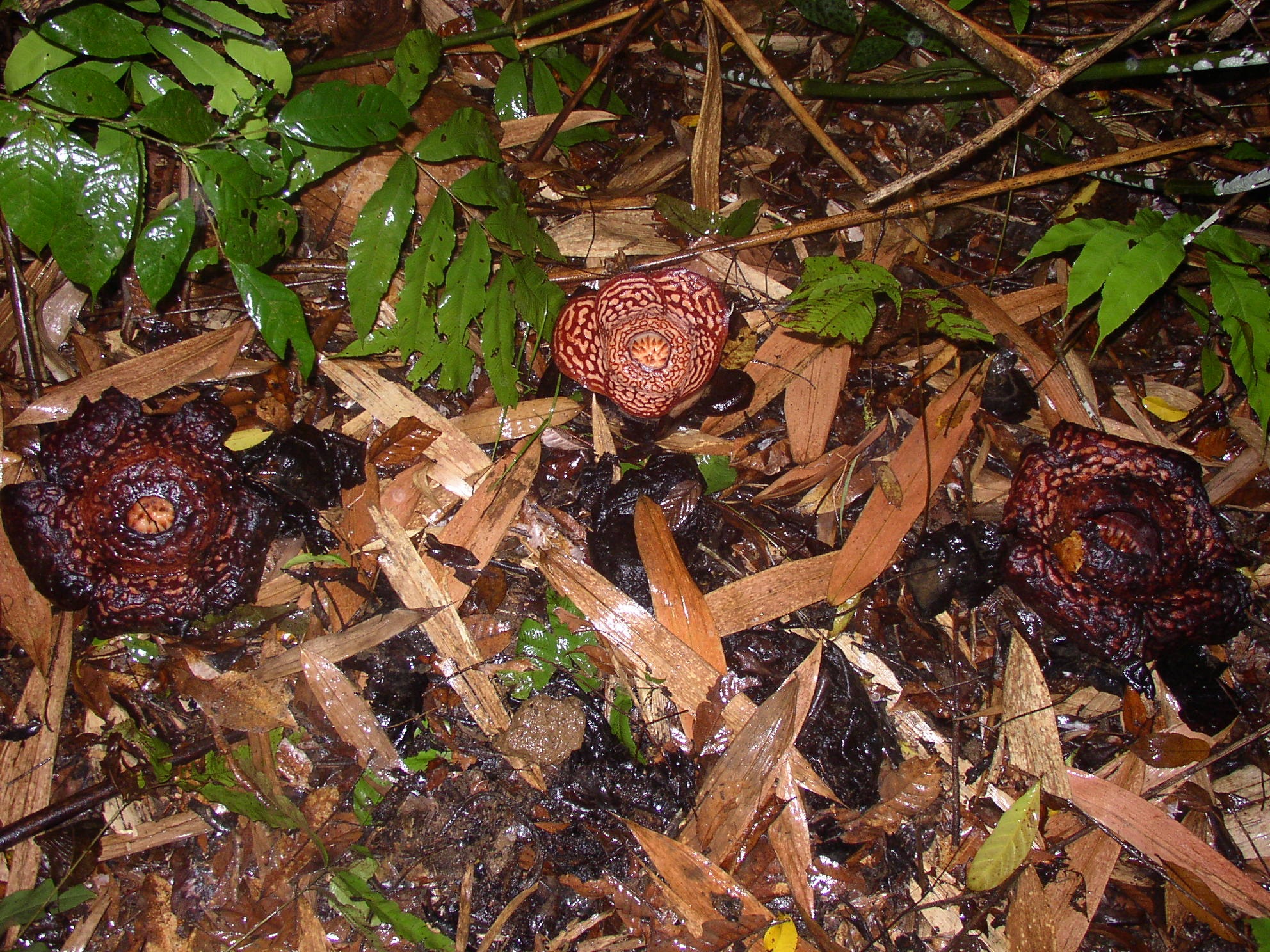 Rafflesia pricei near Mount Kinabalu, Sabah, Malaysia.